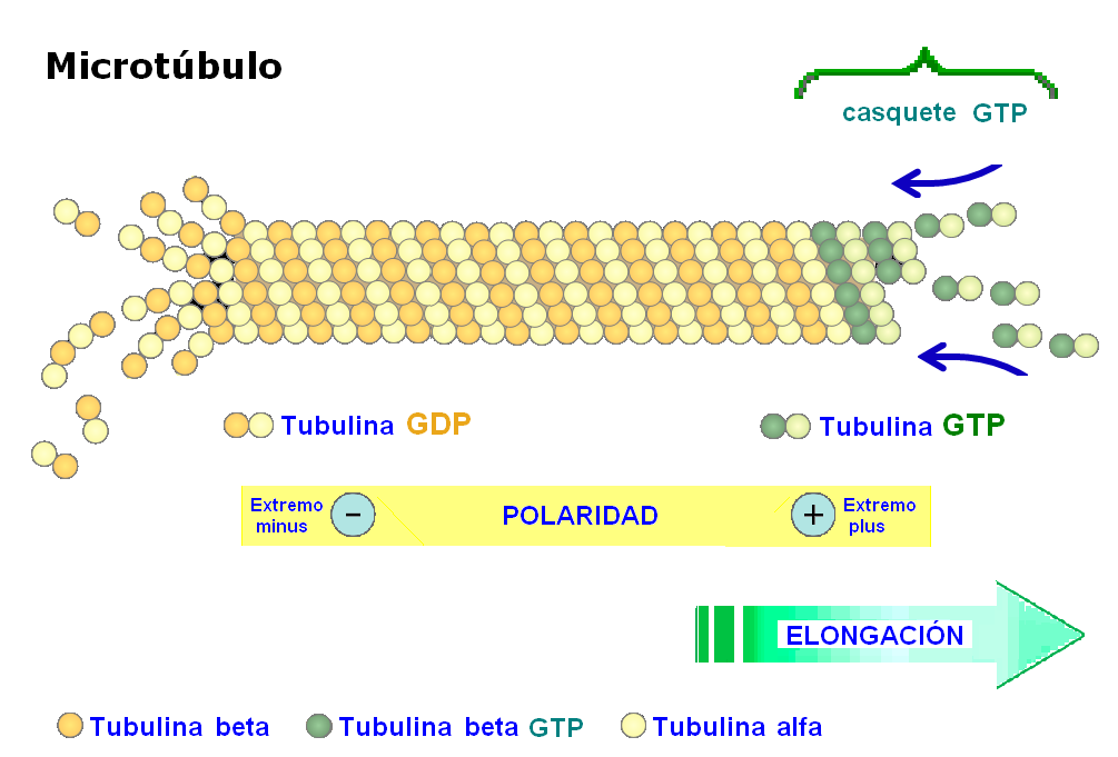 Microtúbulo. Alternancia de tubulinas alfa y beta. Polaridad del microtúbulo: extremos (polos) plus end y minus end. Elongación dinámica debida a polimerización del casquete GTP en polo plus end.